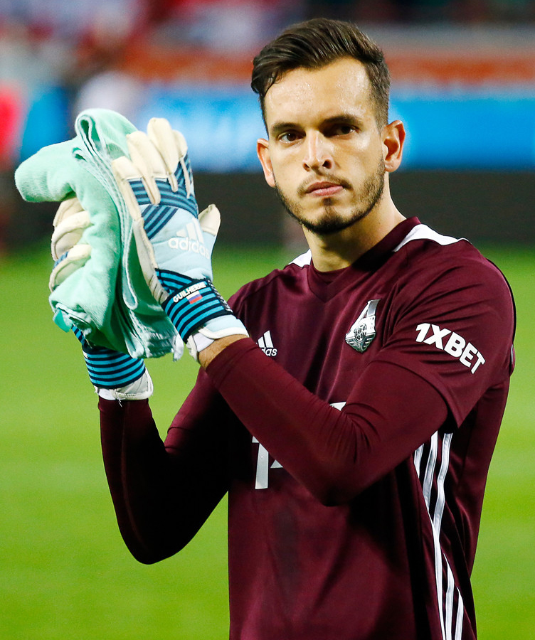 «Локомотив» - «Амкар»